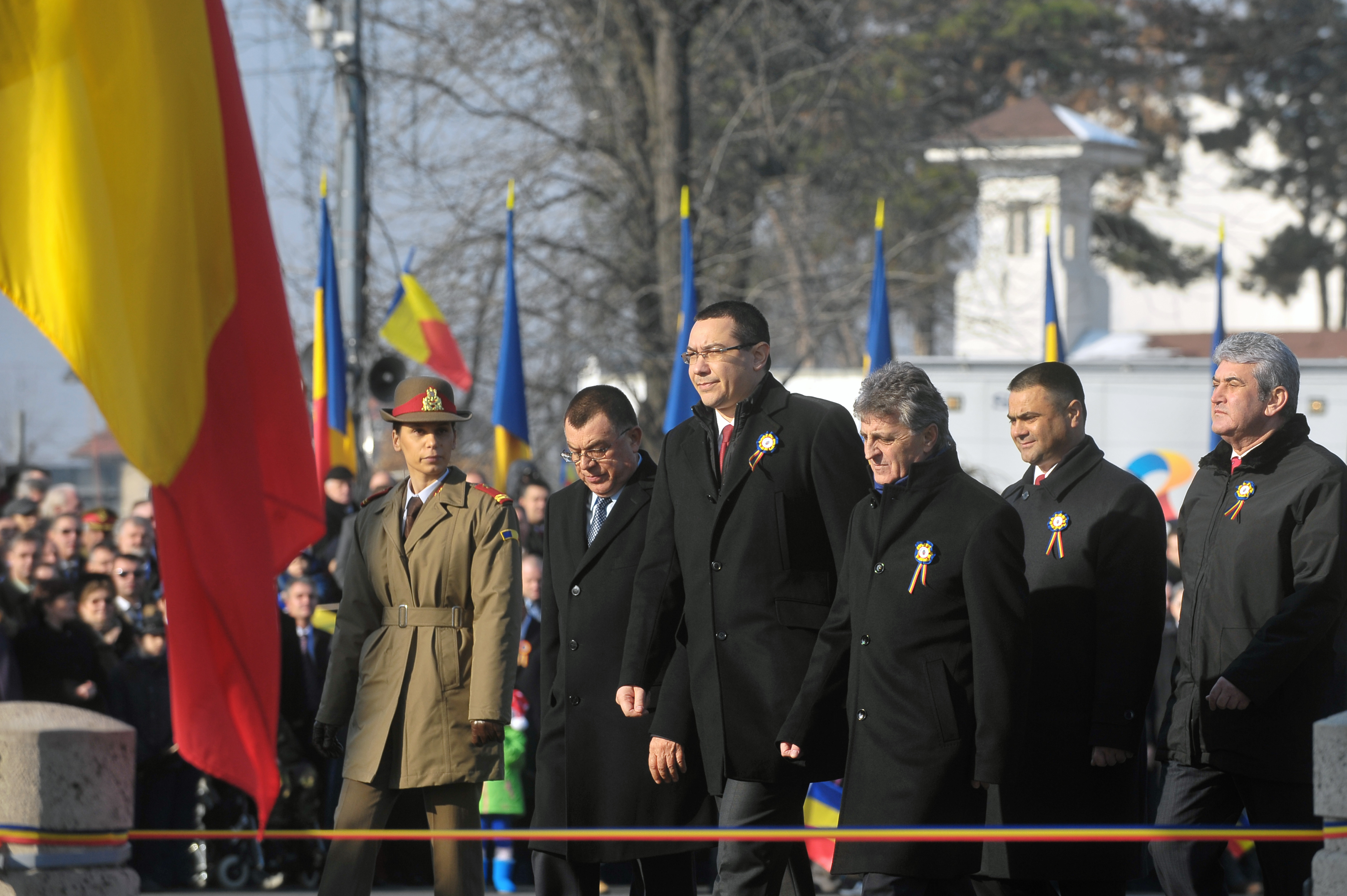 Victor Ponta la Arcul de Triumf din Bucuresti, de Ziua Nationala a Romaniei